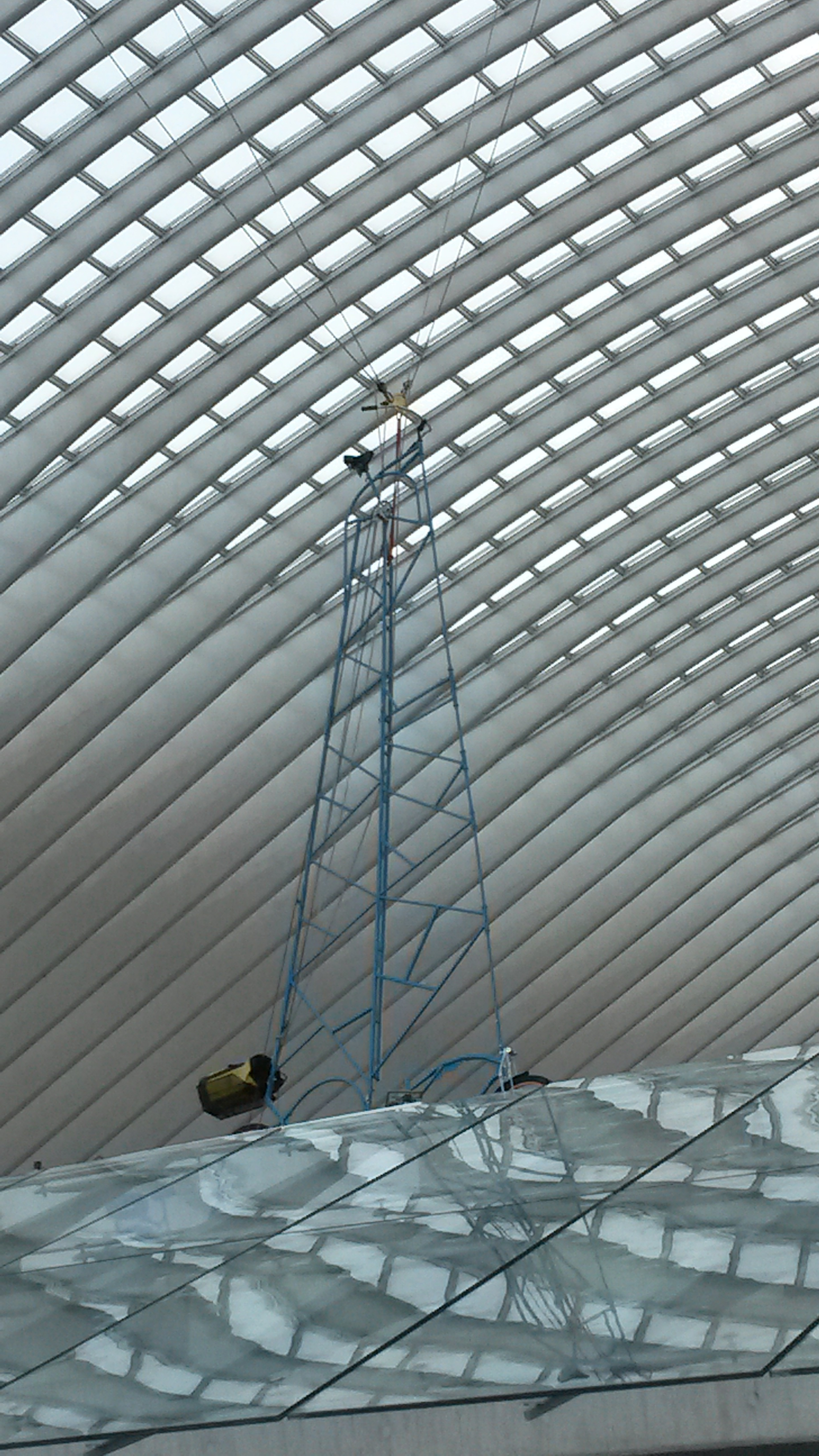 Plus grand vélo du monde (6,3 m) à Liège